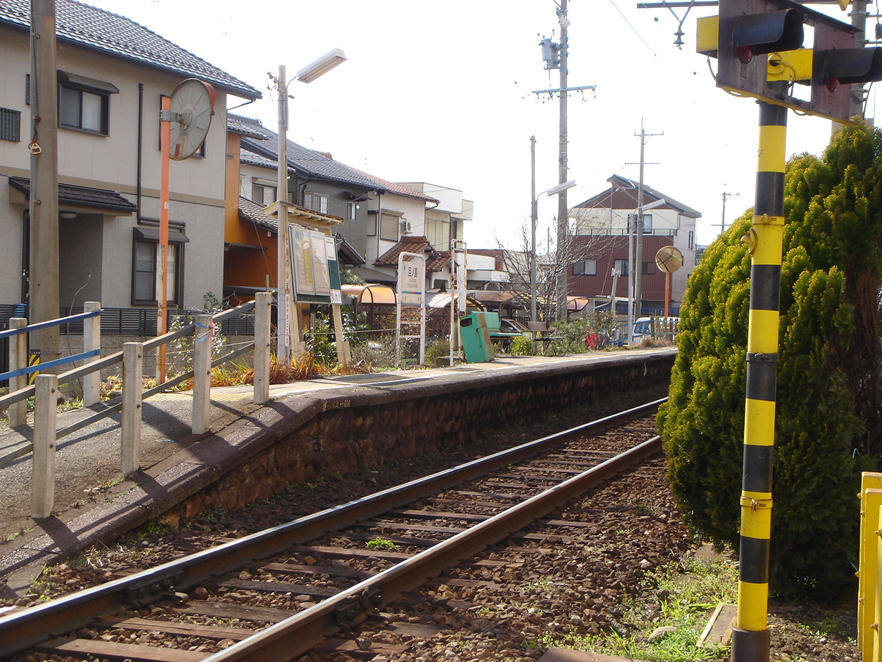 Dannoshima Station(旦ノ島駅),(廃線となる前の名鉄揖斐線),Gifu,Gifu,Japan(岐阜県岐阜市)で撮影